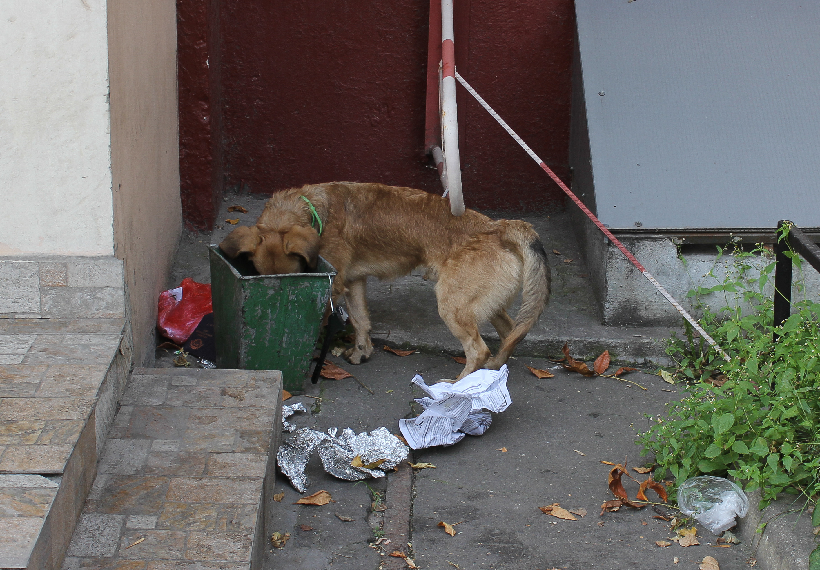 Бродячая собака ест из мусорного ведра в Москве